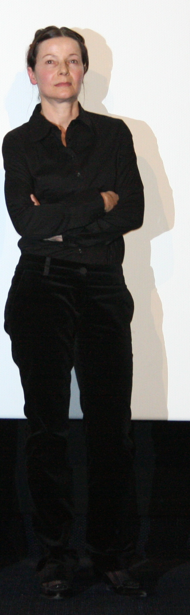 Dominique Reymond à l'avant-première du Nouveau protocole diffusée à l'UGC Ciné Cité Bercy, à Paris.